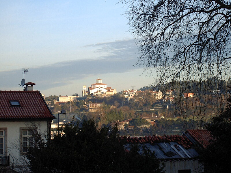 Panorâmica de Azurém, Guimarães, Portugal